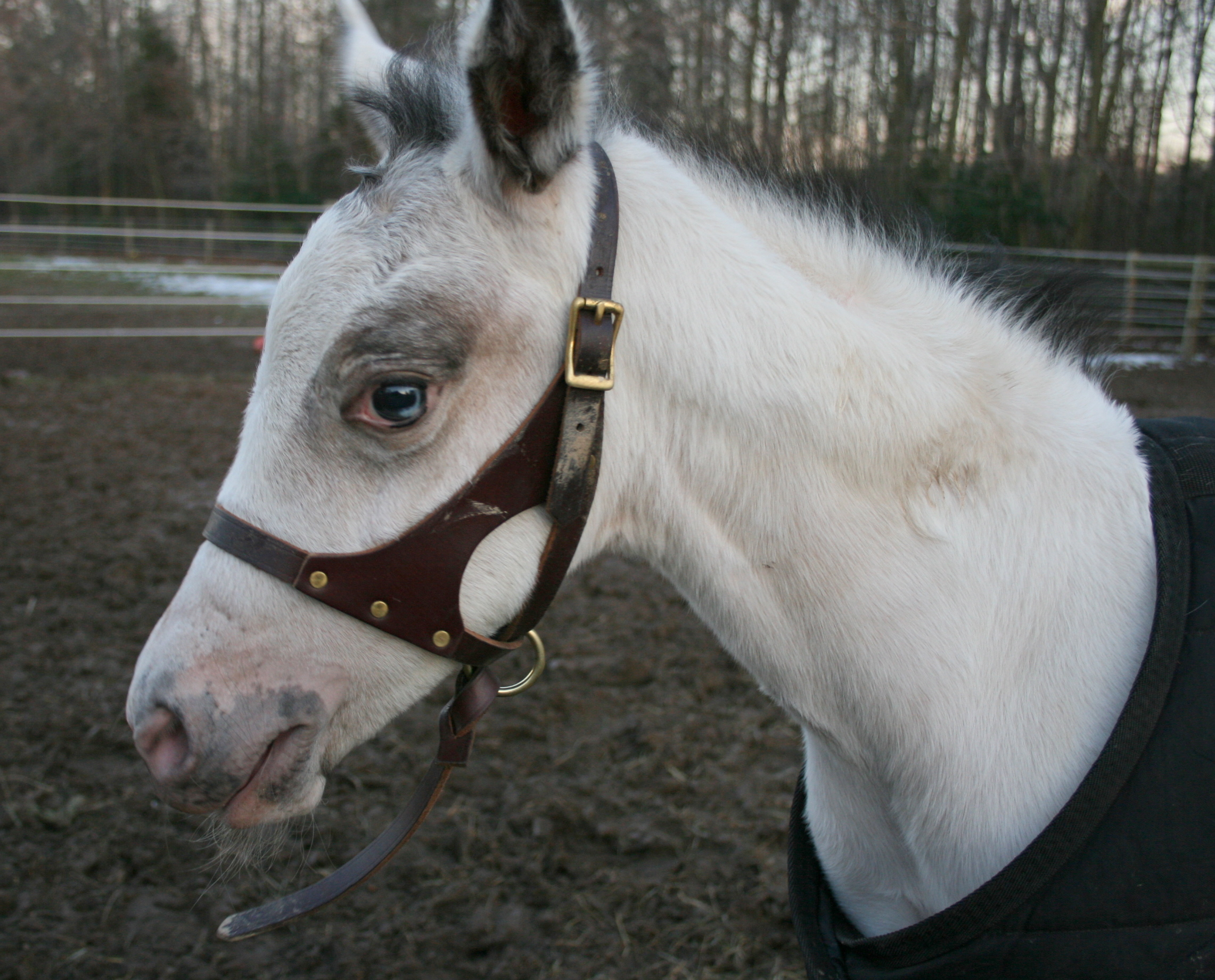 Appaloosa foal